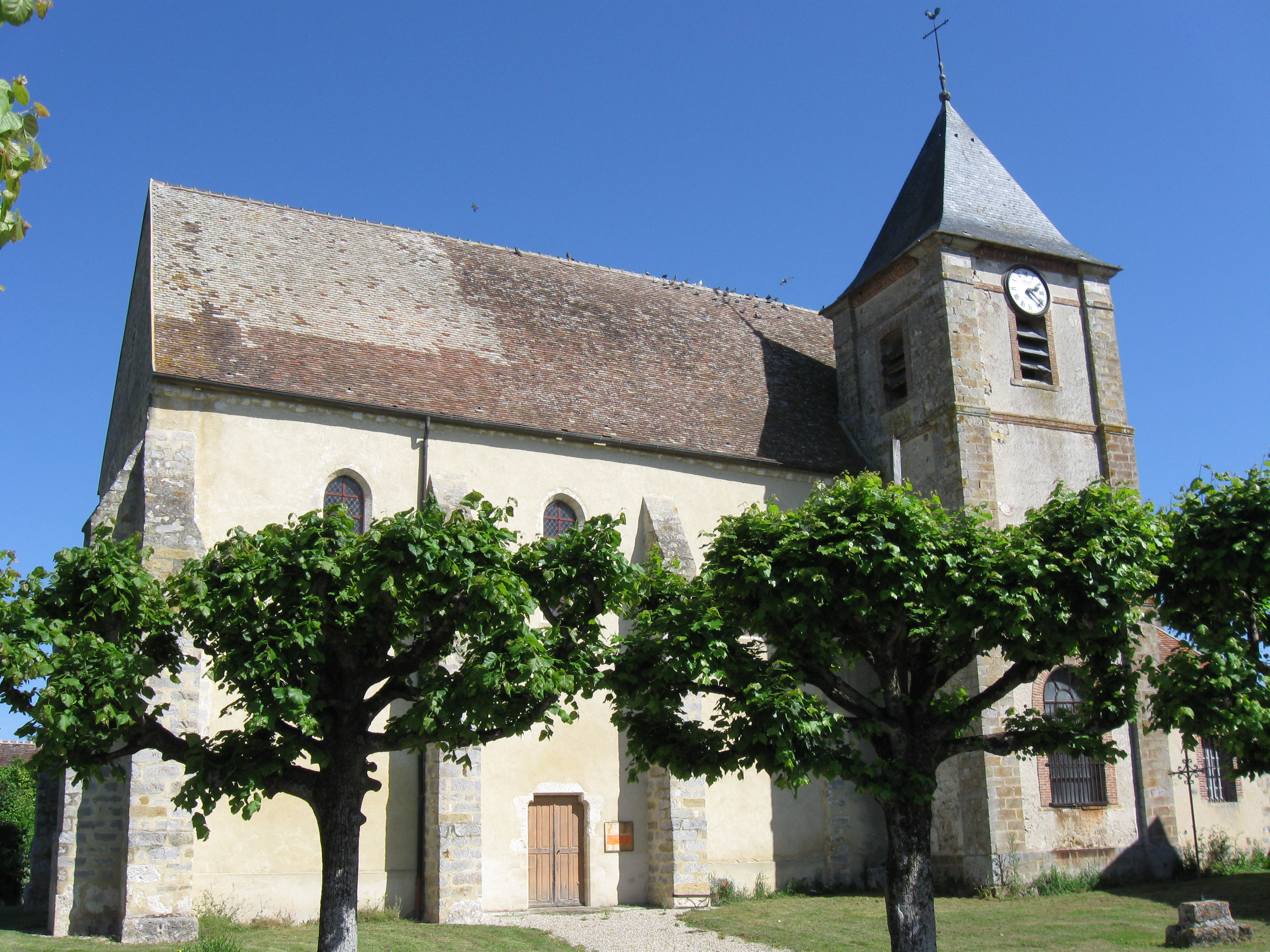 Église Saint-Pierre de Jaulnes. (Seine-et-Marne, région Île-de-France).